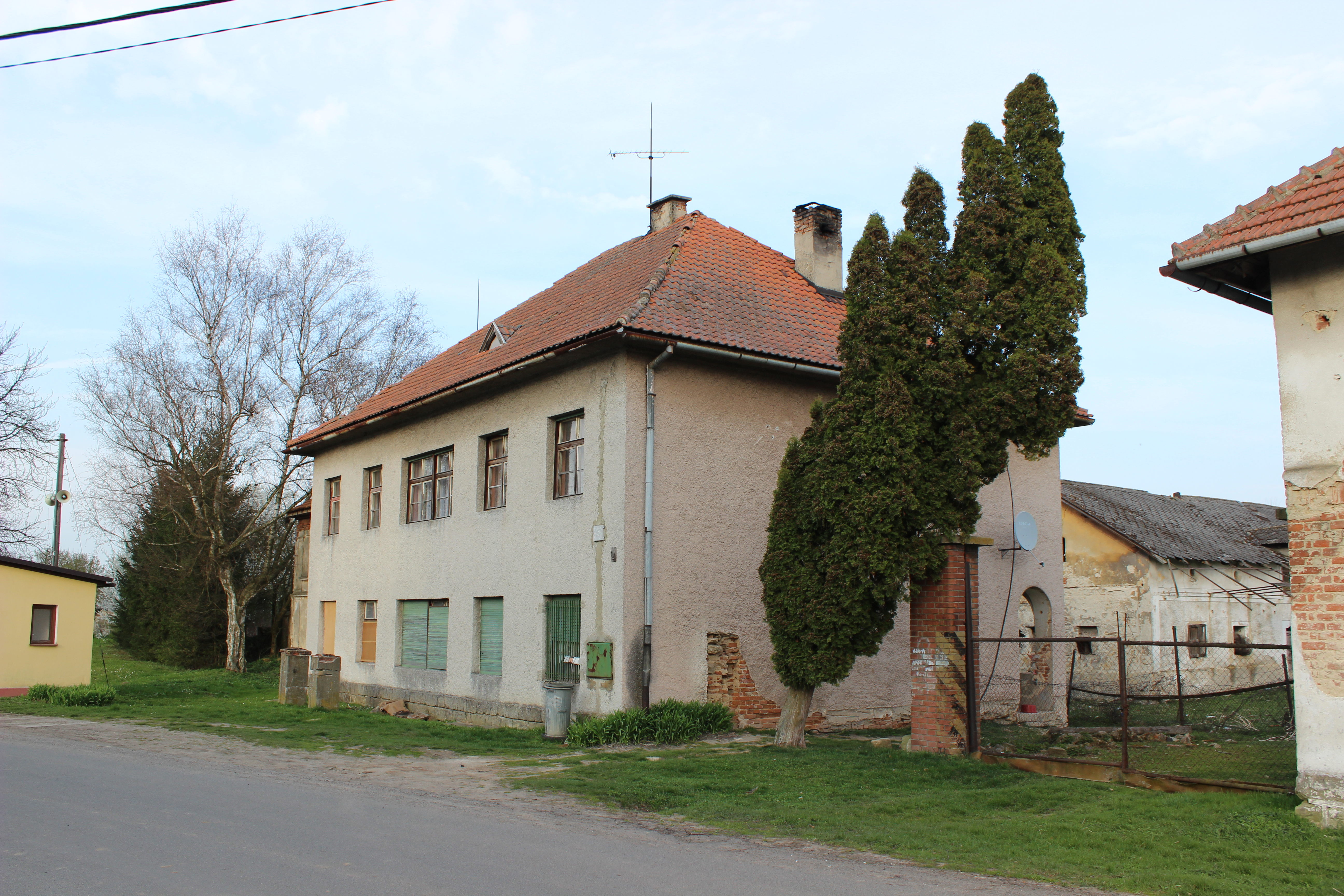 Dům na návsi v Ledcích, části Kadlína. This photograph was taken with a Canon EOS 600D.